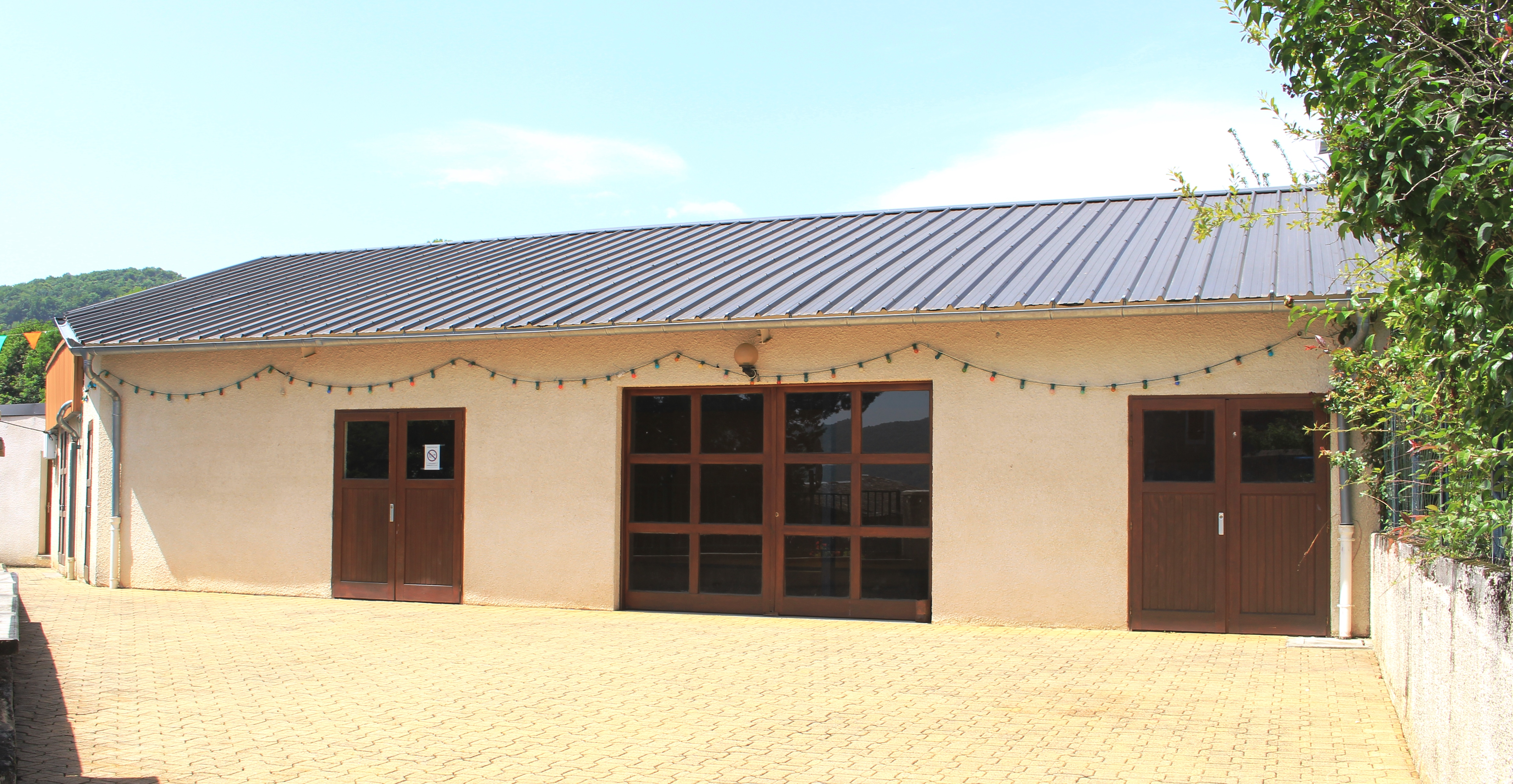 Salle des fêtes de Saint-Arroman (Hautes-Pyrénées)